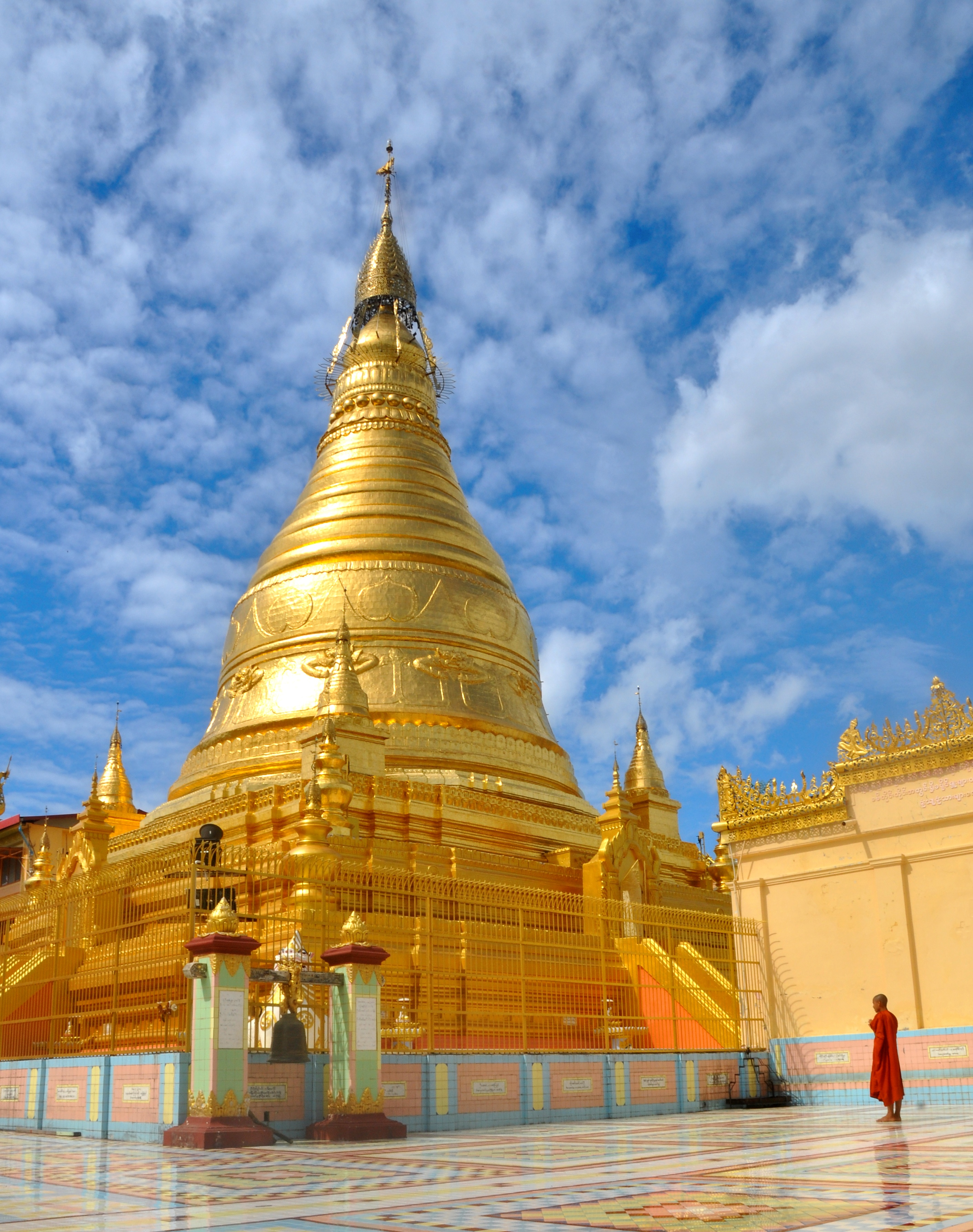 ဆွမ်းဦးပုညရှင် ကုသိုလ်ပြုနေသော ကိုရင်လေး